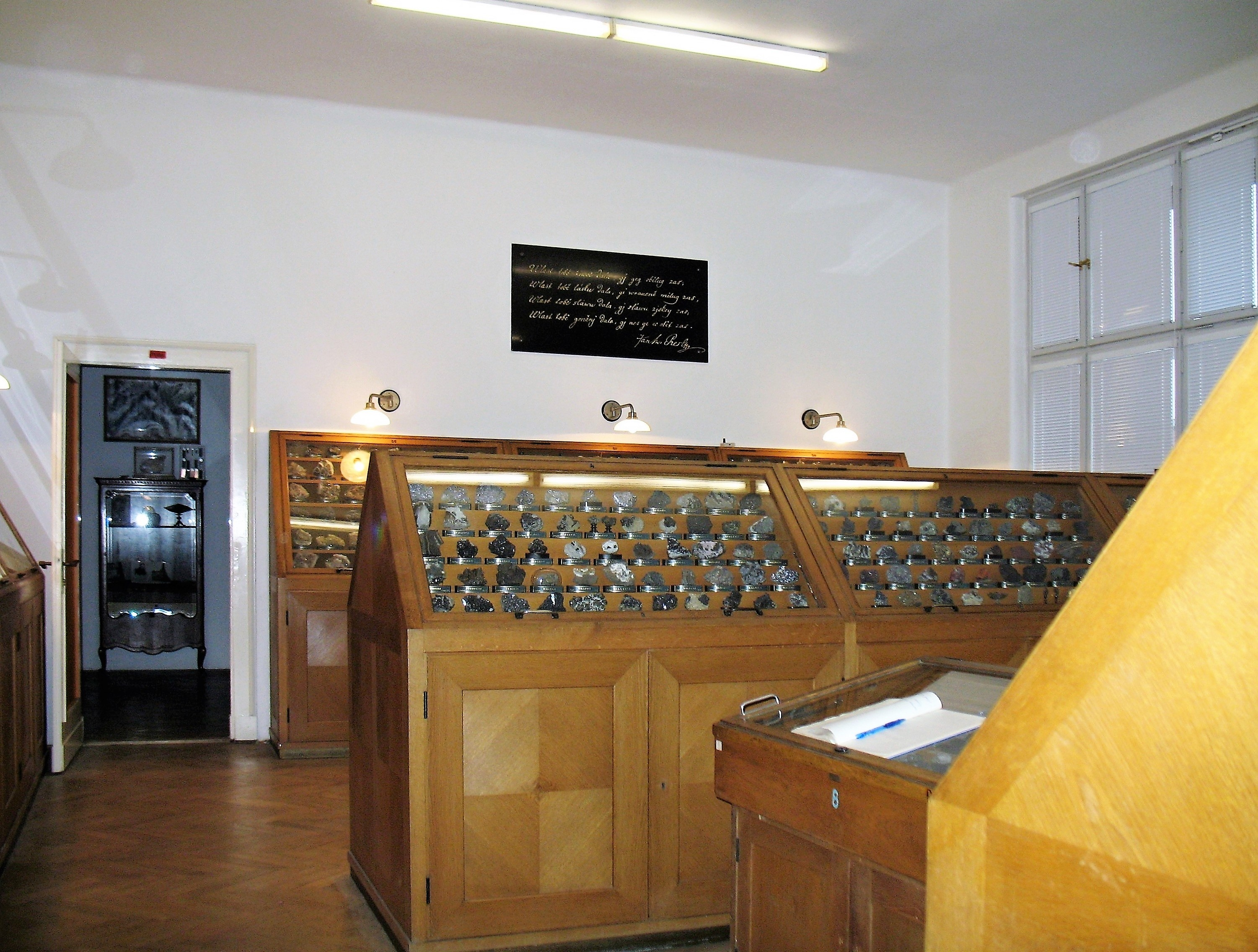 Mineralogické sbírky Vysoké školy chemicko-technologické v Praze